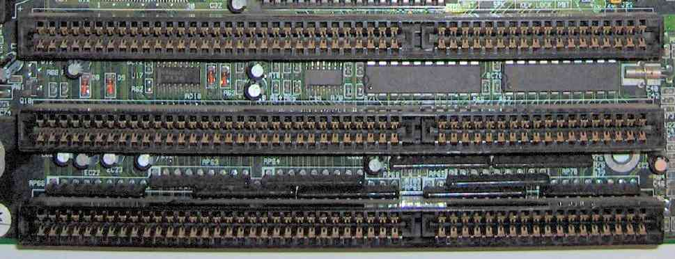 Buses ISA de una placa Pentium I Foto tomada por Jorge González. BUS ISA